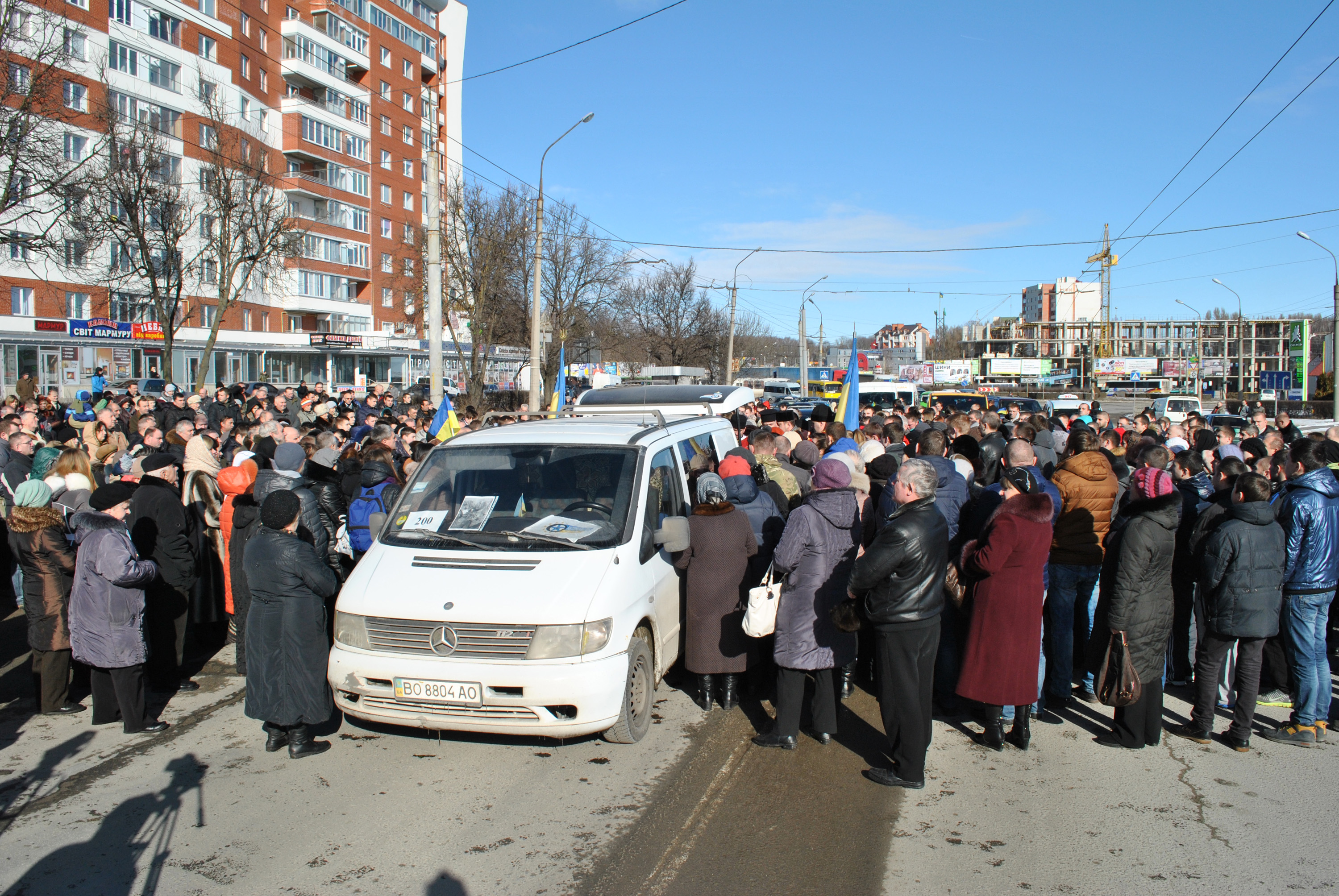 Зустріч у Тернополі 10 лютого тіла воїна-героя 128-ї гірсько-піхотної бригади (Мукачеве) Олександра Орляка, який загинув 6 лютого 2015 року під час виконання бойового завдання поблизу Дебальцевого.